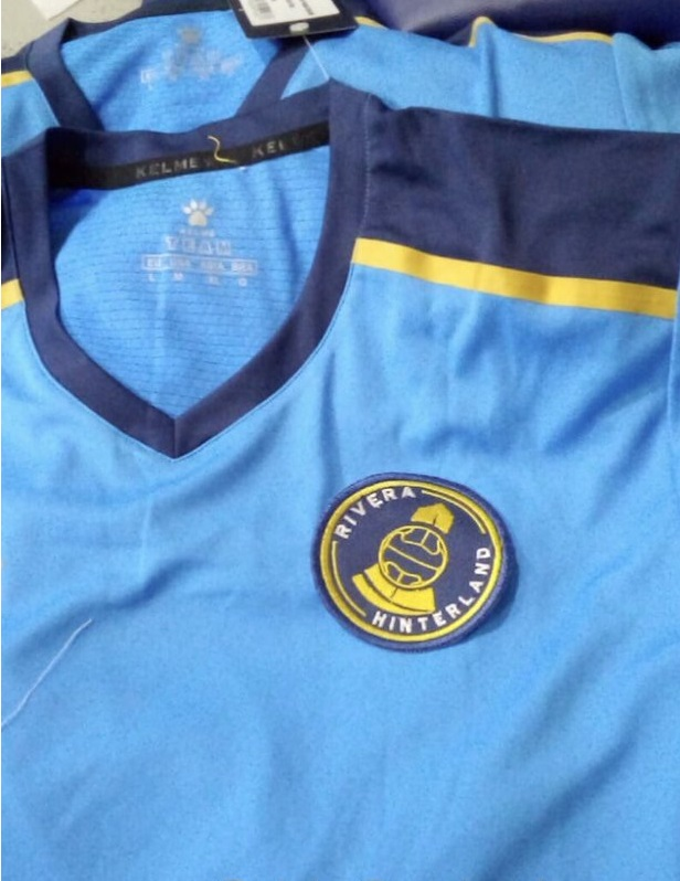 Camiseta Rivera Hinterland 2020 (ex Rivera Livramento)